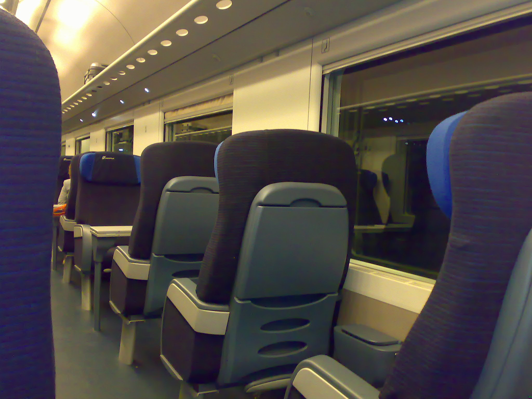 Interno della carrozza di prima classe di un EuroCity